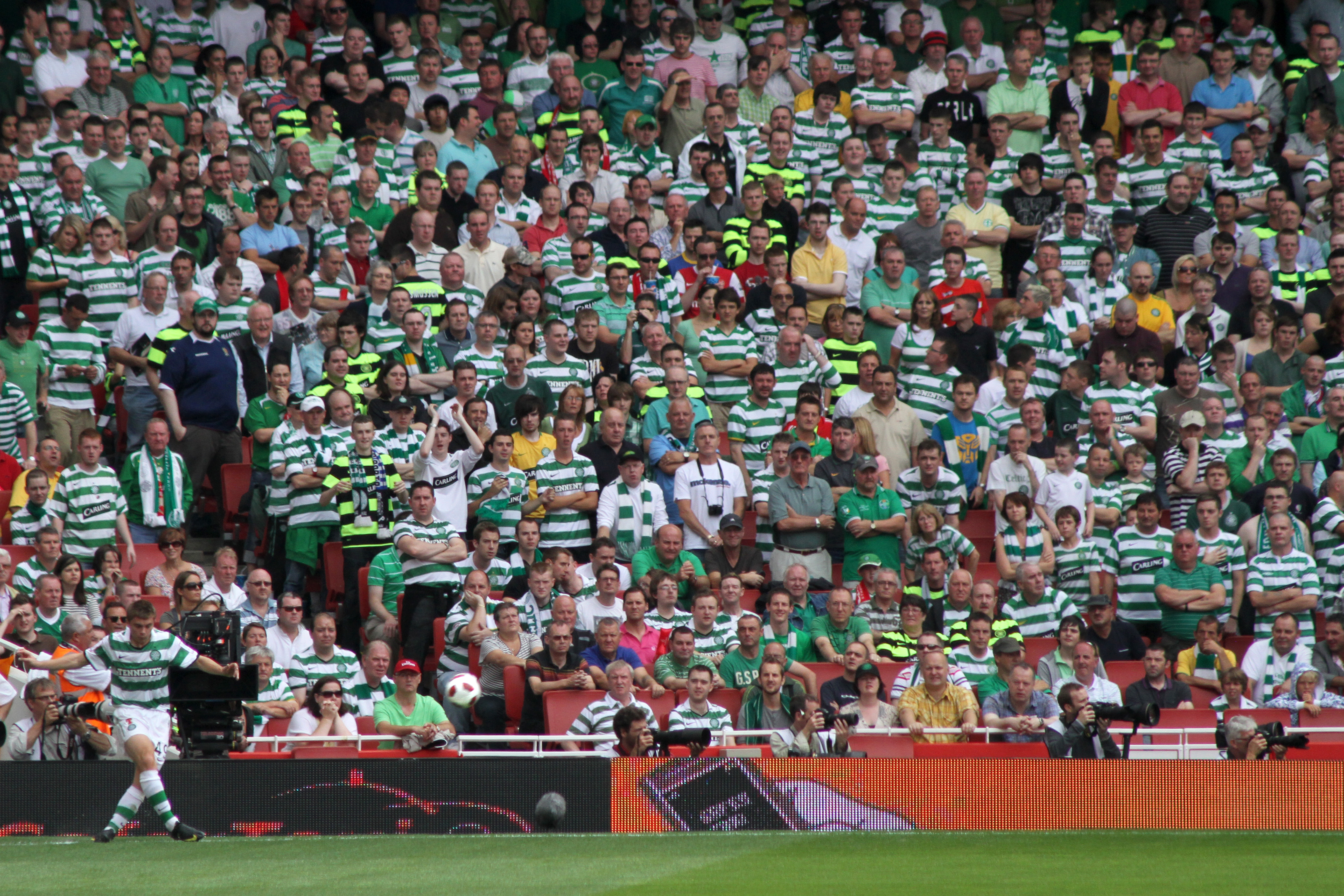 Emirates Cup 2010 - Celtic v Olympique lyonnais